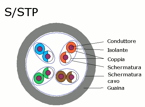 Struttura di un cavo UTP (Traduzione)